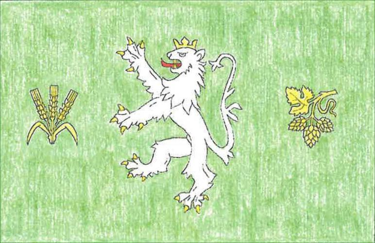 Smilovice, okres Rakovník, vlajka